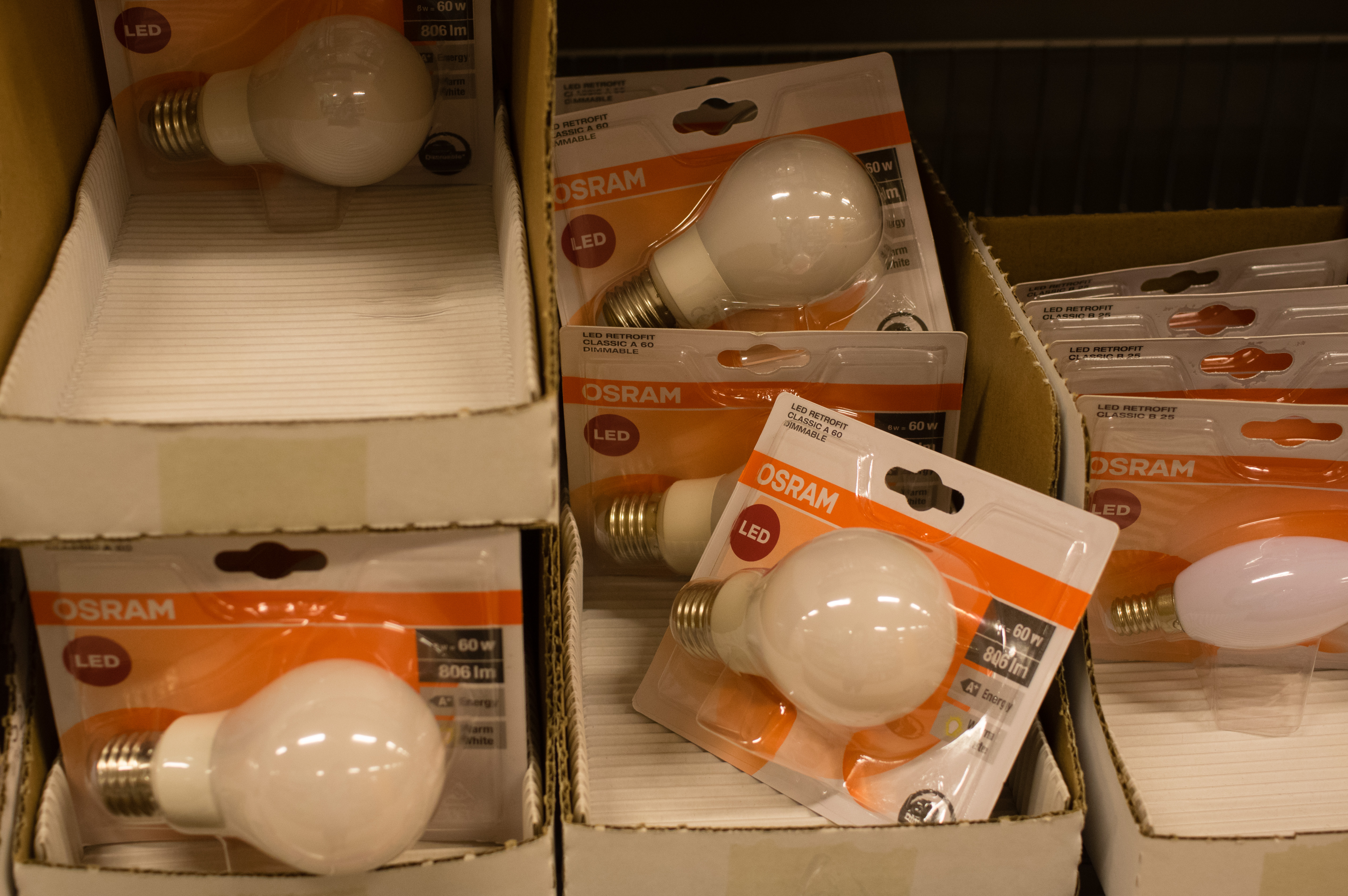 Osram lyspærer i butikkhylle.